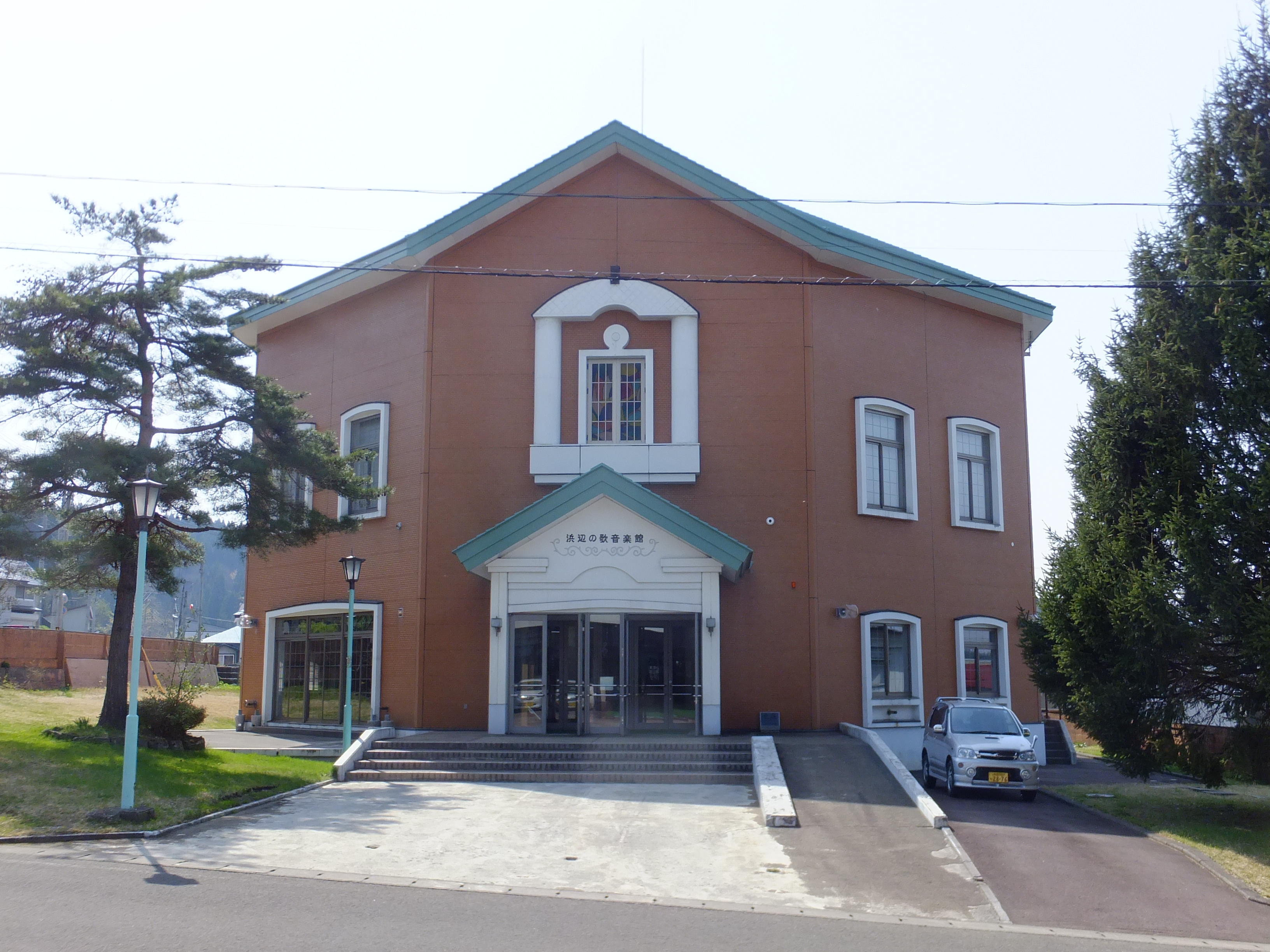 浜辺の歌音楽館（秋田県北秋田市）。唱歌『浜辺の歌』作曲者の成田為三が当地の出身であることに由来する。